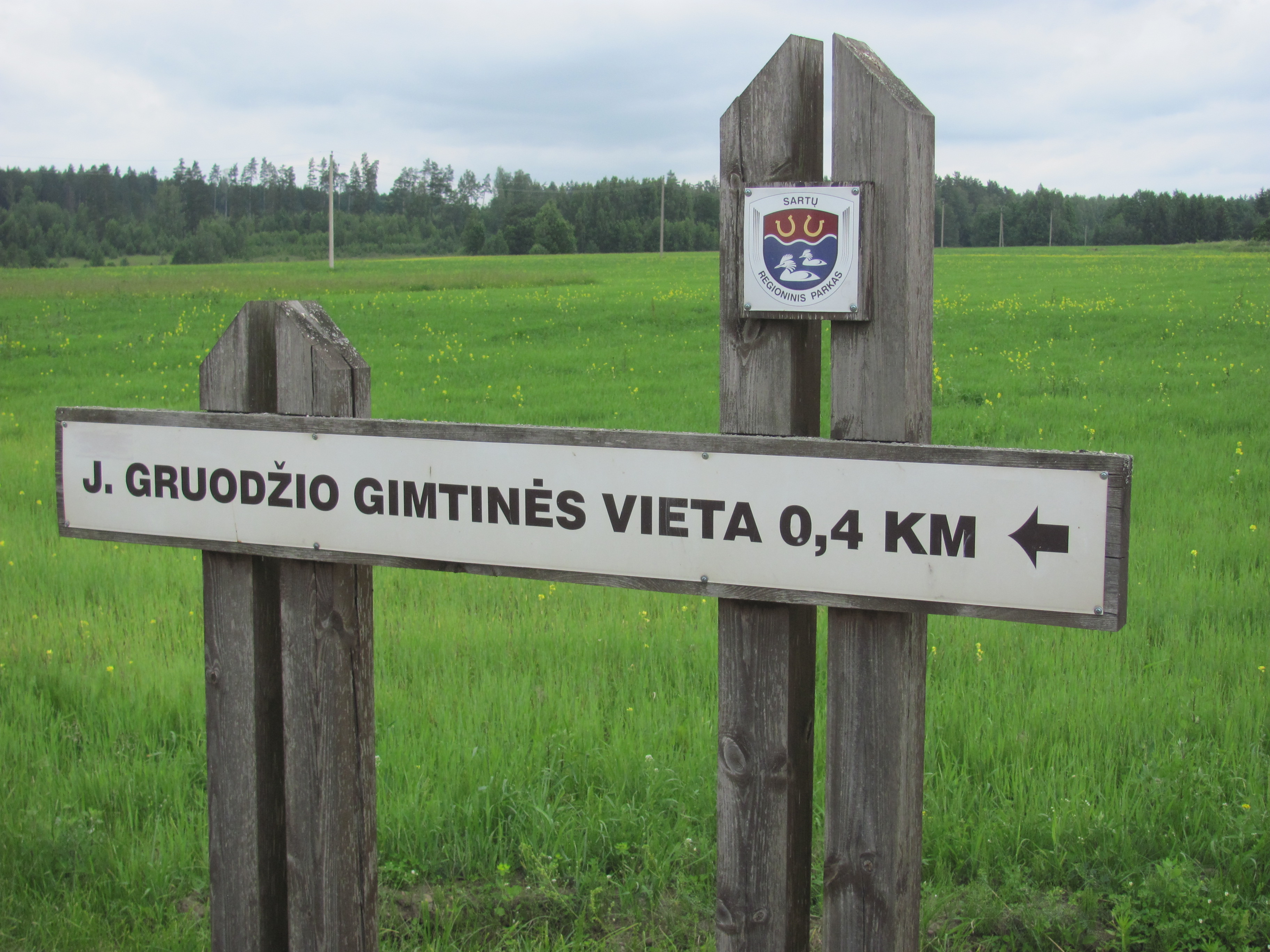 Rokėnai, Lithuania